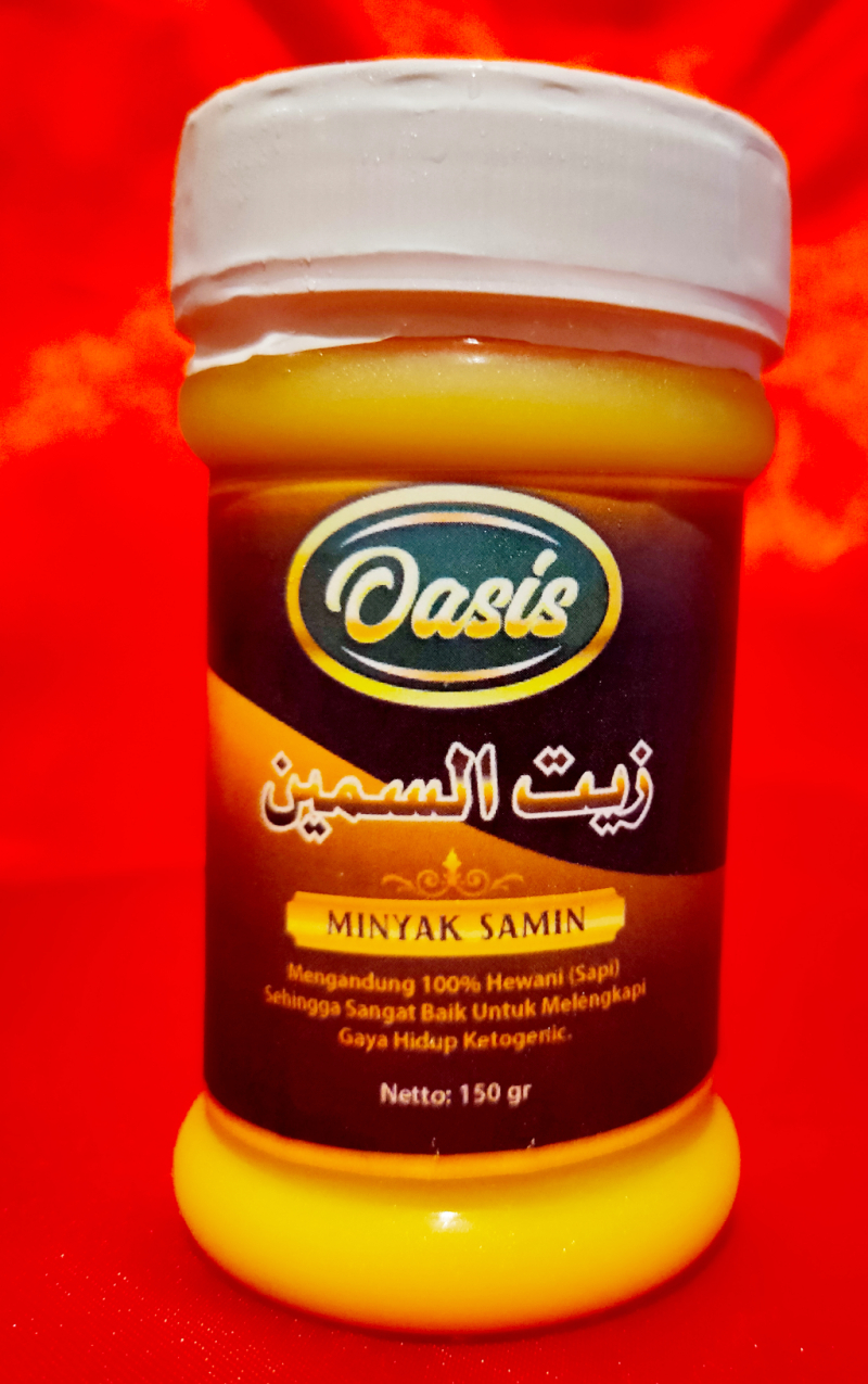 Minyak samin hewani